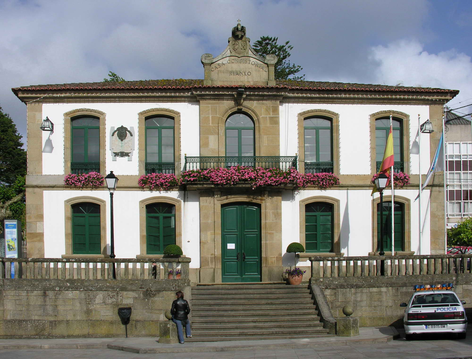 Concello de Rianxo, A Coruña, Galicia. Publish by= Luis Miguel Bugallo Sánchez. Self made